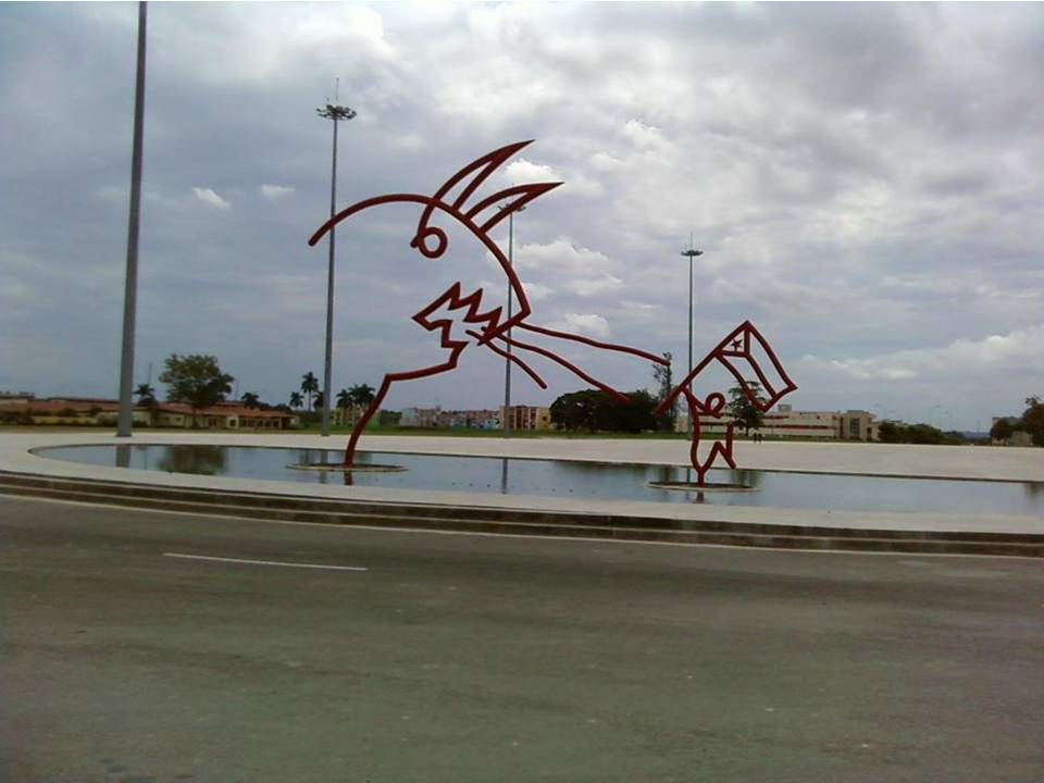 "Plaza Niemeyer" que debe su nombre al centenario arquitecto brasileño Oscar Niemeyer, diseñador de la misma.